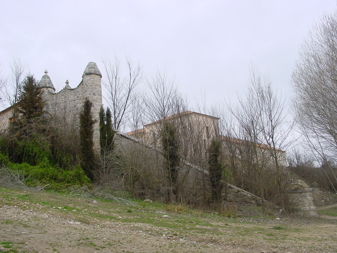 Valbuena de Duero, Valladolid, España. Monasterio de Santa María de Valbuena. Lienzo de la antigua muralla que rodeaba el monasterio.